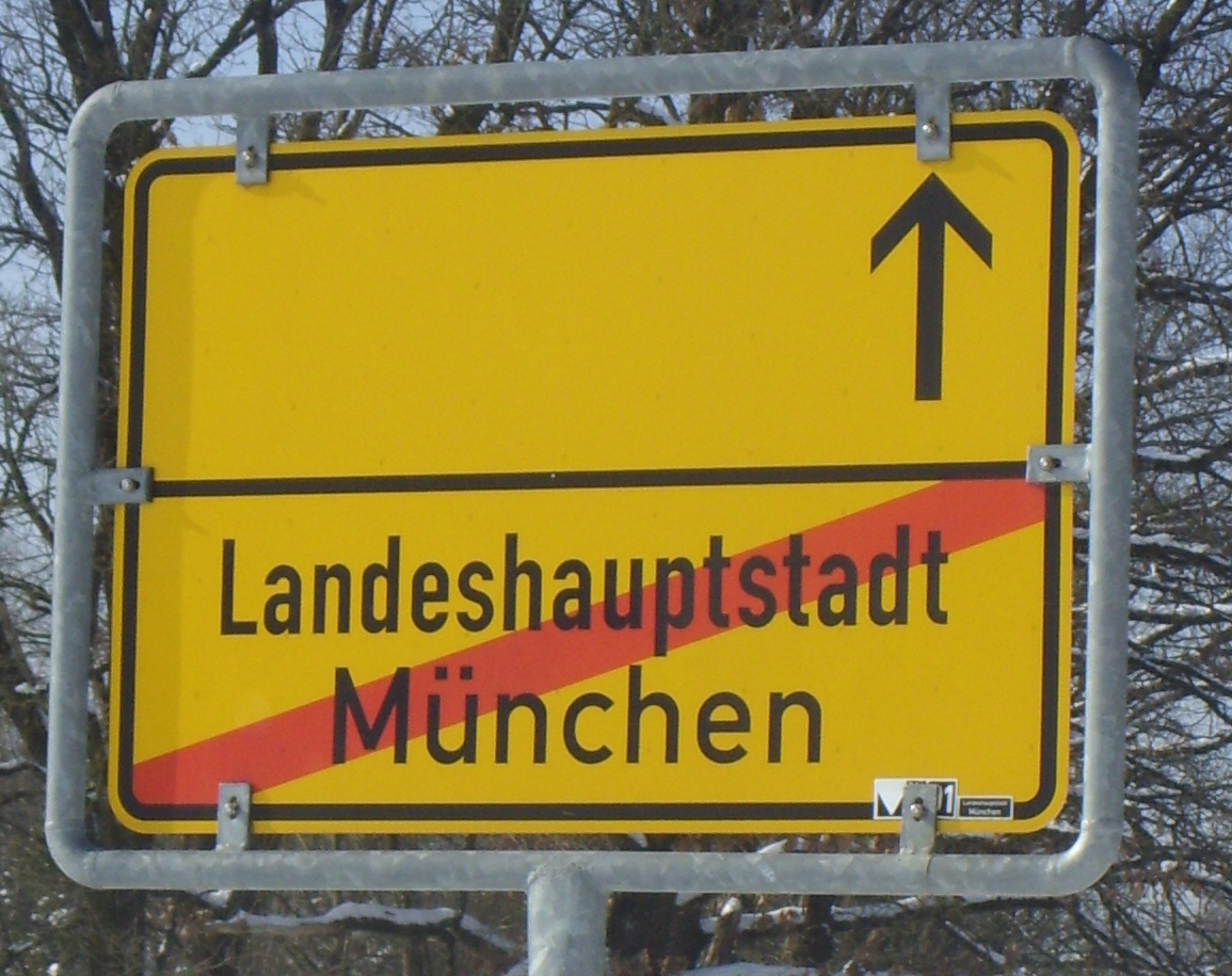 Ortsausgangsschild in München